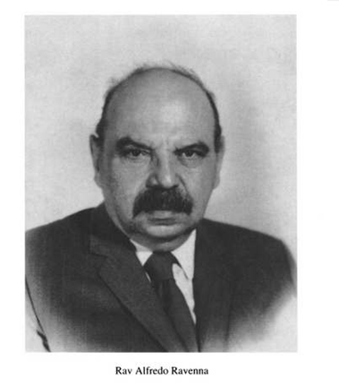 Rabbino italiano